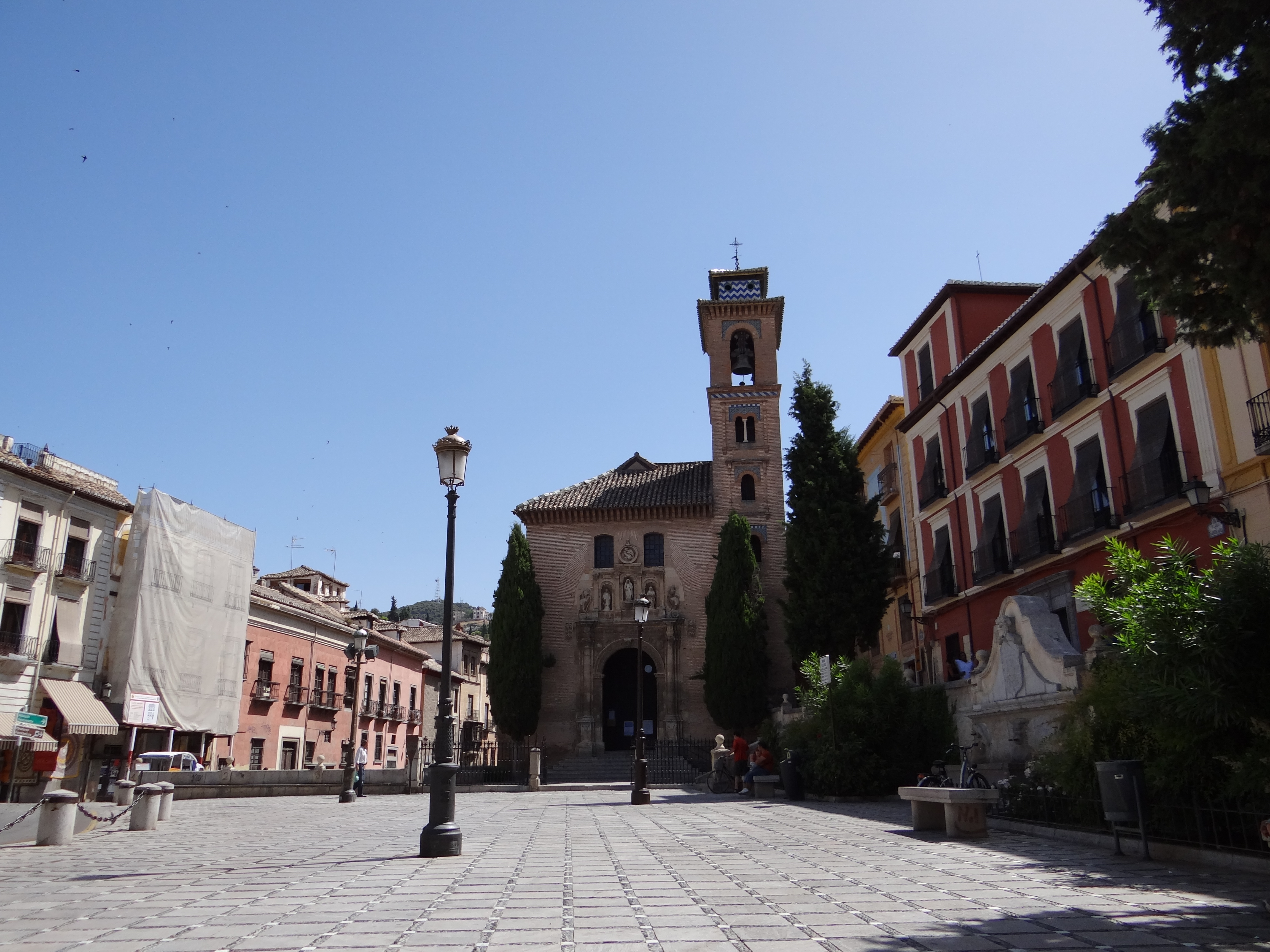 Plaza de Santa Ana, al fondo la iglesia del mismo nombre y a la derecha el pilar del Toro.